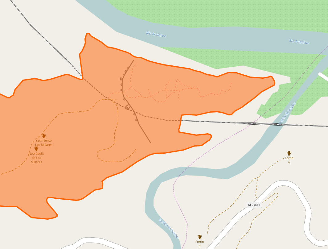 Map of Los Millares Archeological site coded in OpenStreetMap. Link to the